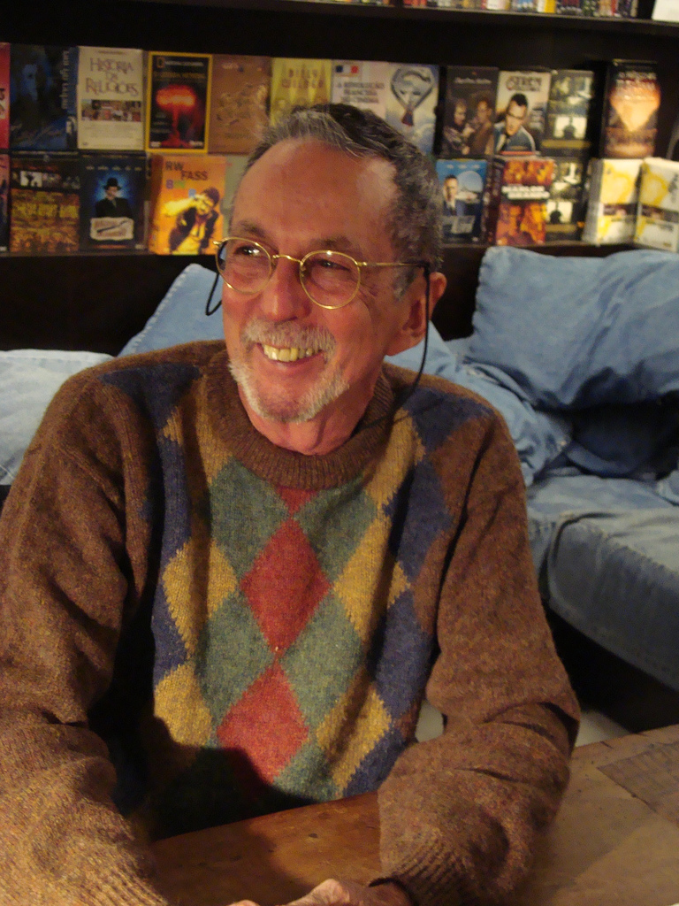 Foto do cientista e escritor Gil Martins Felippe